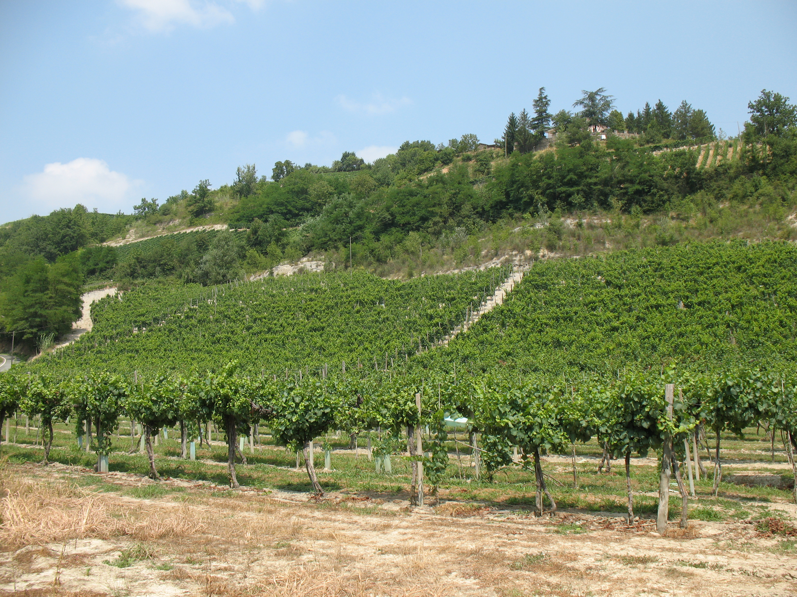 Loazzolo, in the Valle Bormida (Bormida Valley), Piemonte, Italy. 27.7.2008